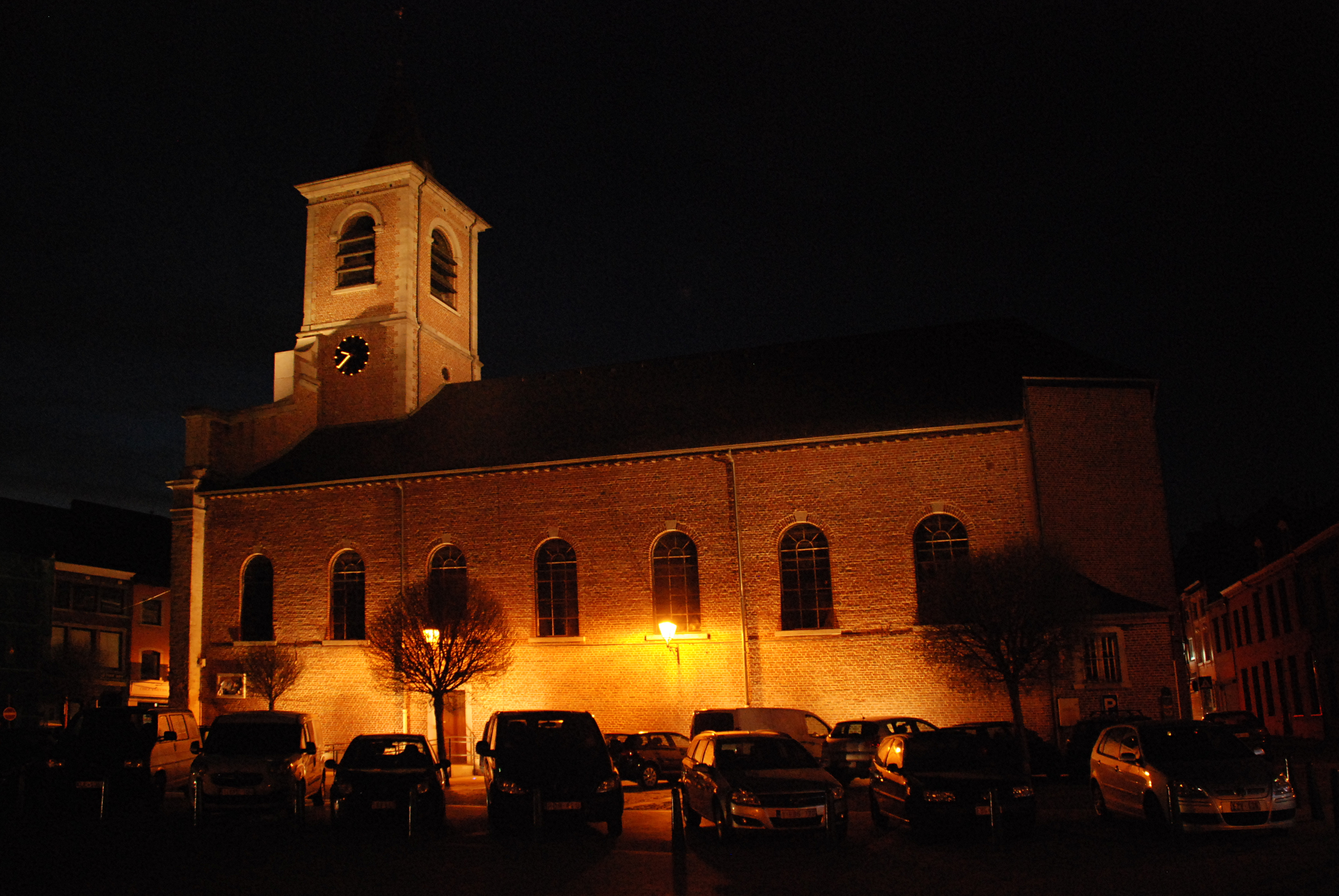 Belgique - Brabant wallon - Église Saint-Jean l'Évangéliste de Genappe